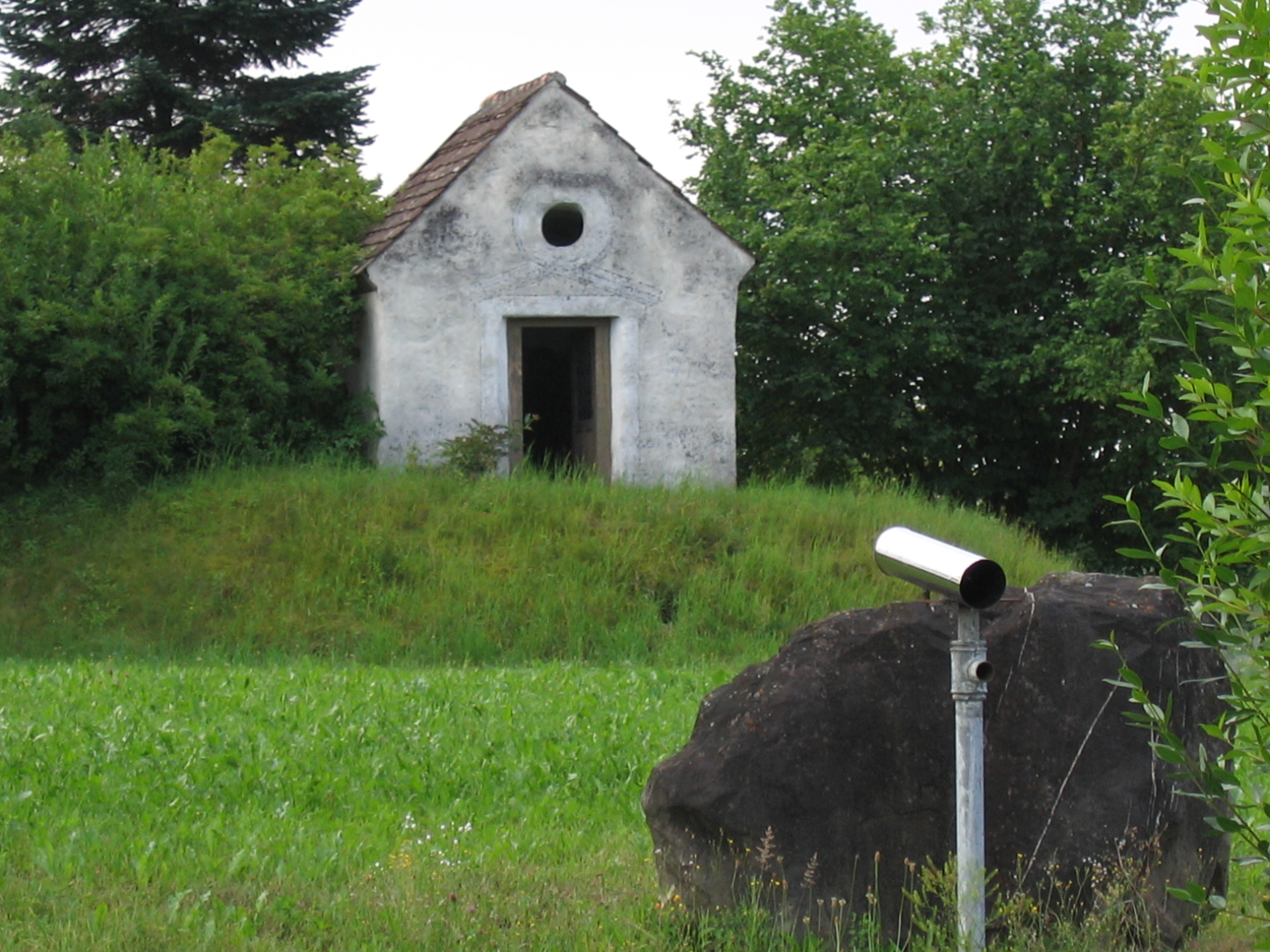 Deutschland - Baden-Württemberg - Bodenseekreis - Kressbronn am Bodensee - Kochermühle: Kapelle